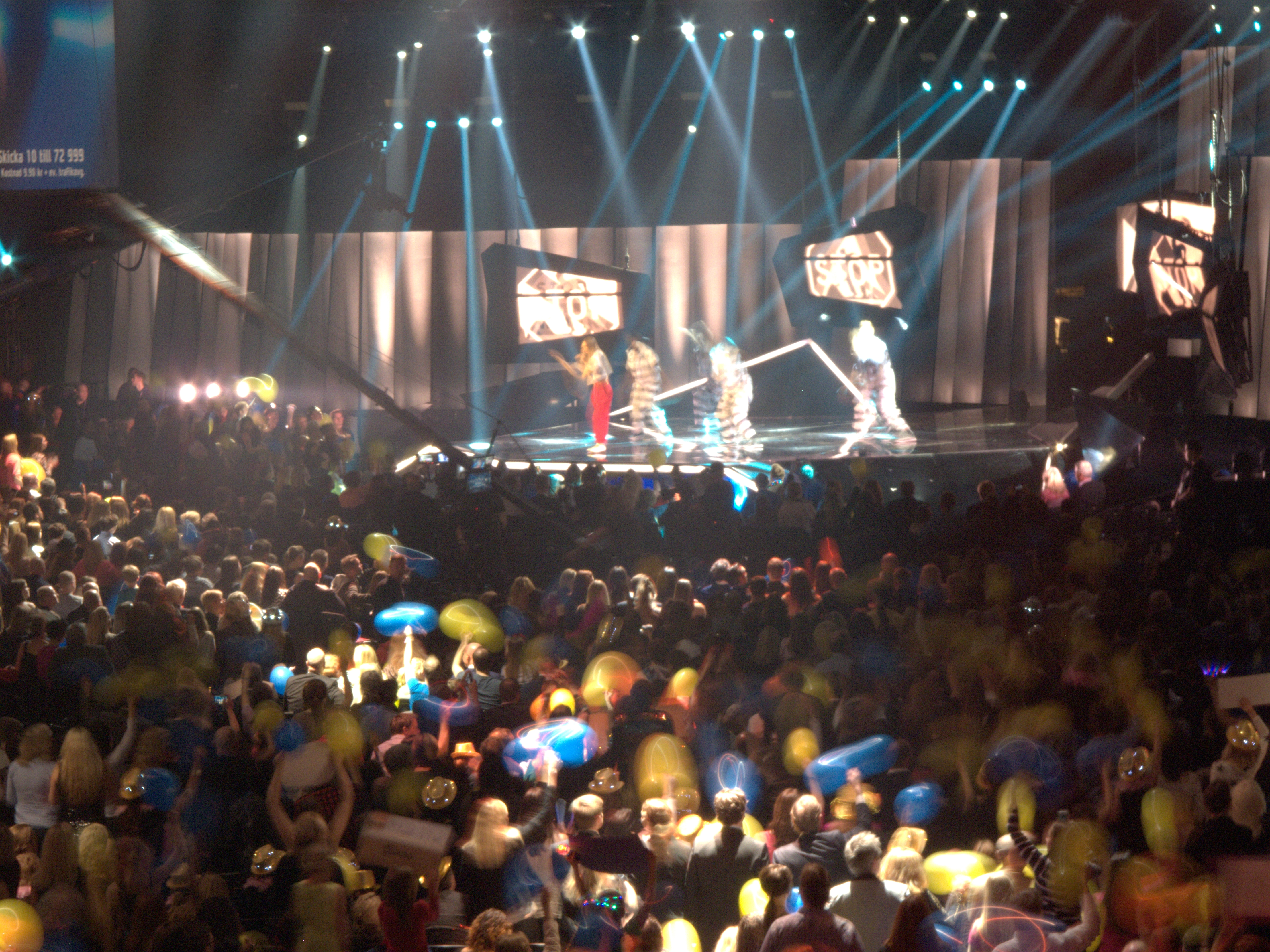 Melodifestivalen 2014 Friends Arena